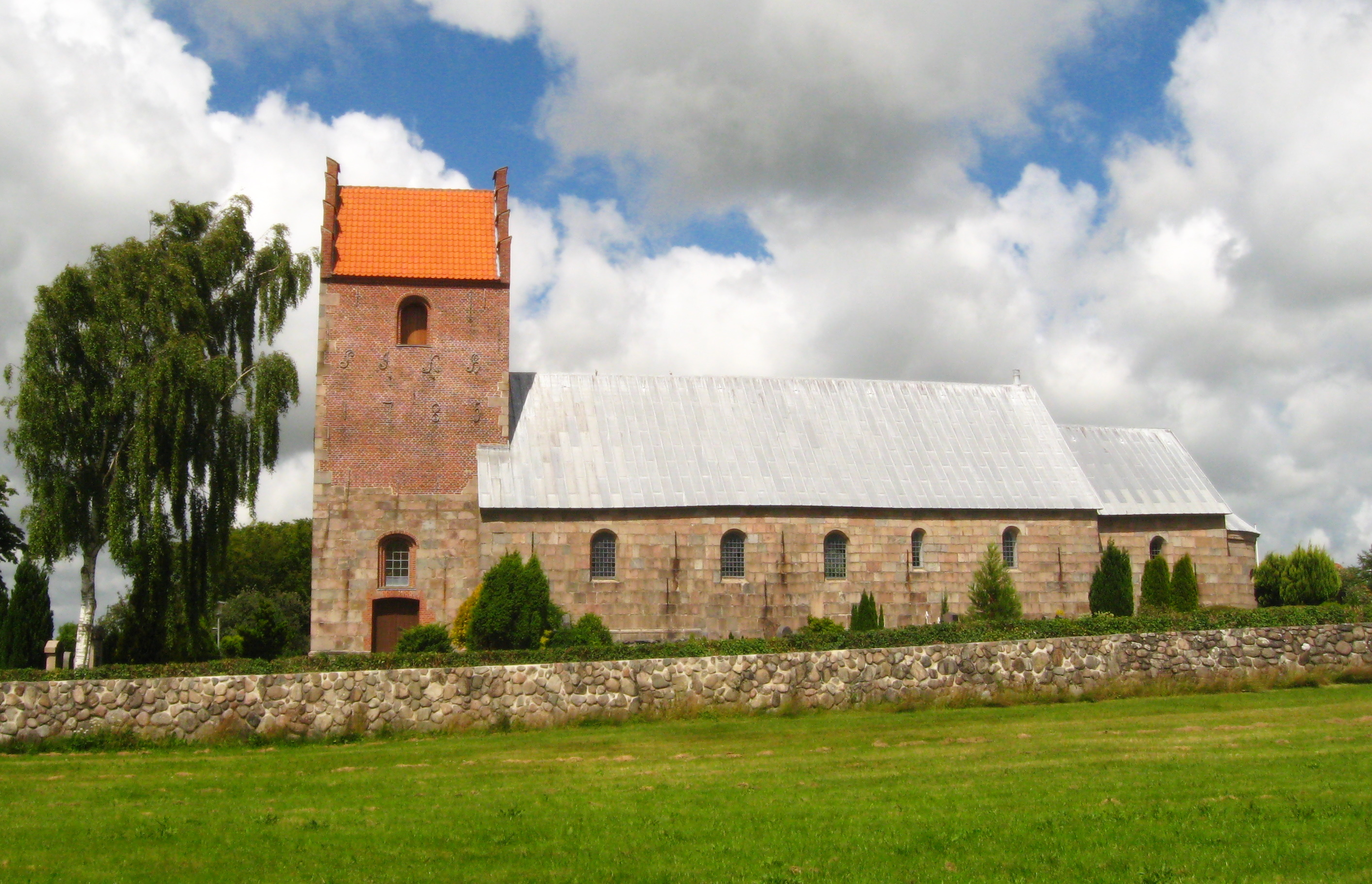 Øster Brønderslev Kirke